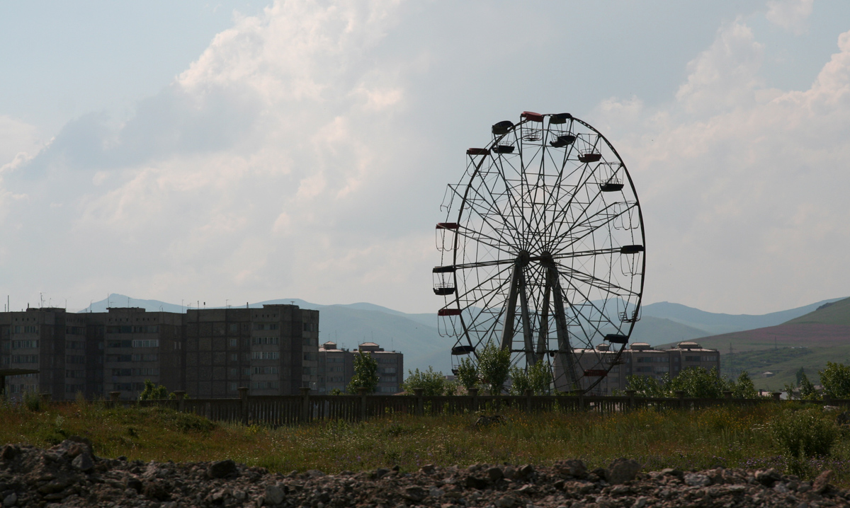 Sevan en Arménie : grande roue à l'abandon